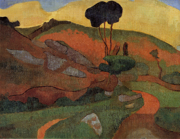 Picture: "Landskab" by Mogens Ballin